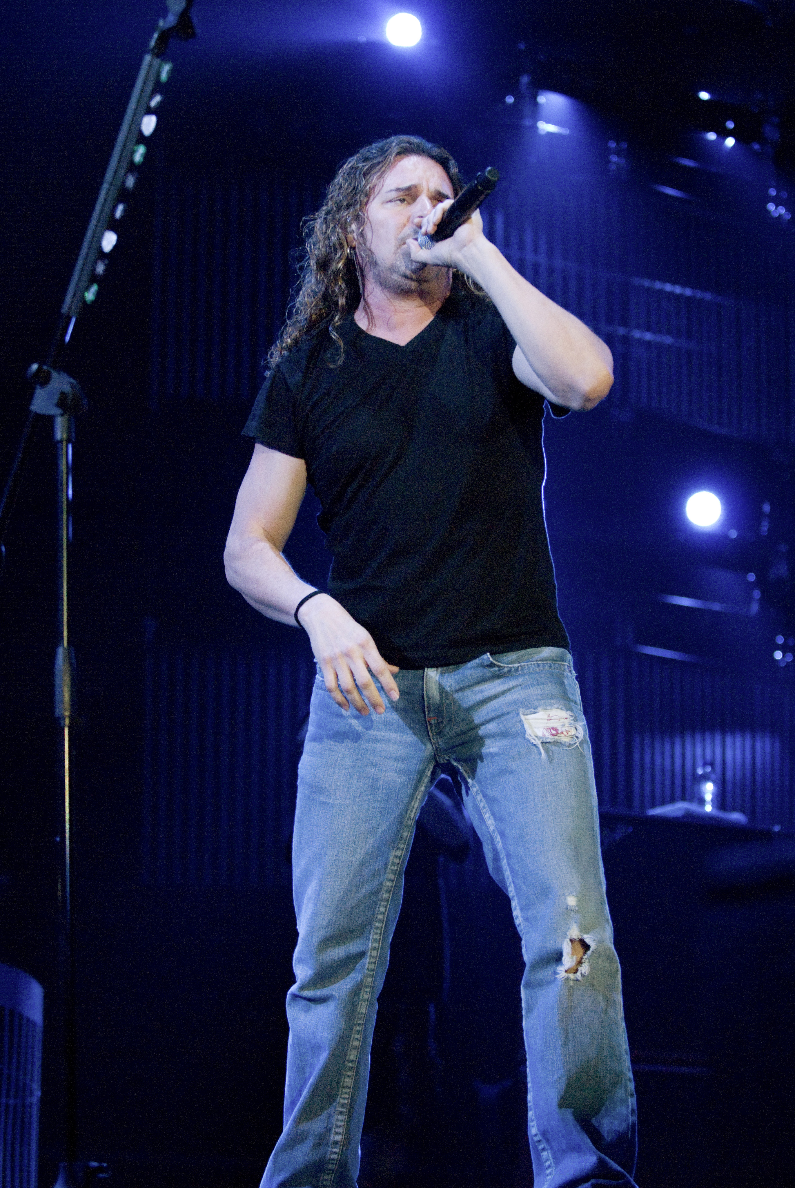 Maná